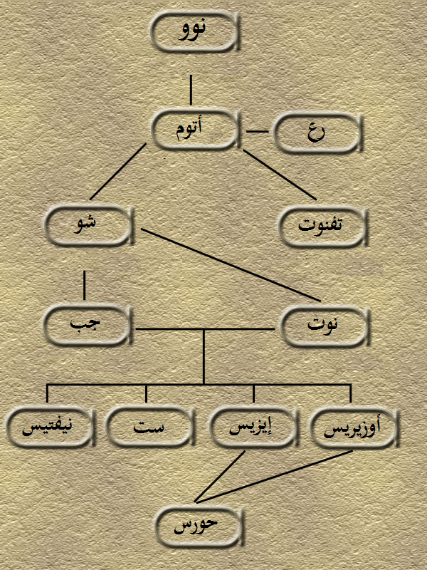 شجرة أنساب بعض الآلهة المصريَّة القديمة وفق ما كانت تنص عليه الميثولوجيا المصريَّة الفرعونيَّة.